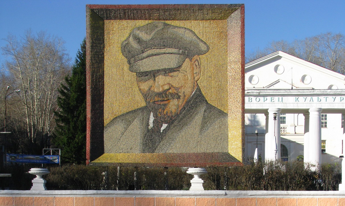 Мозаичное панно с изображением В.И. Ленина на центральной площади в Дегтярске.